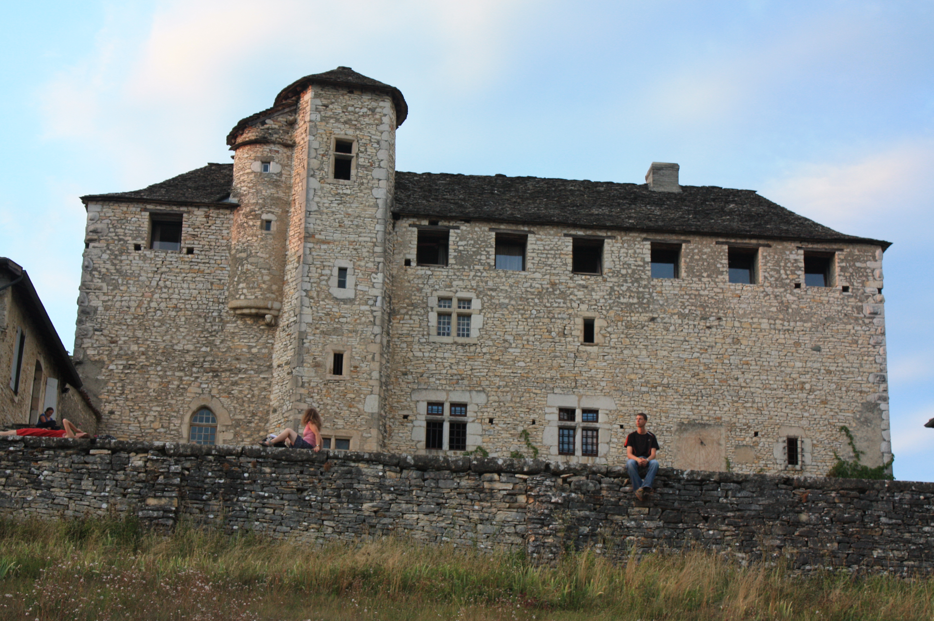 Maison forte de Montagnieu